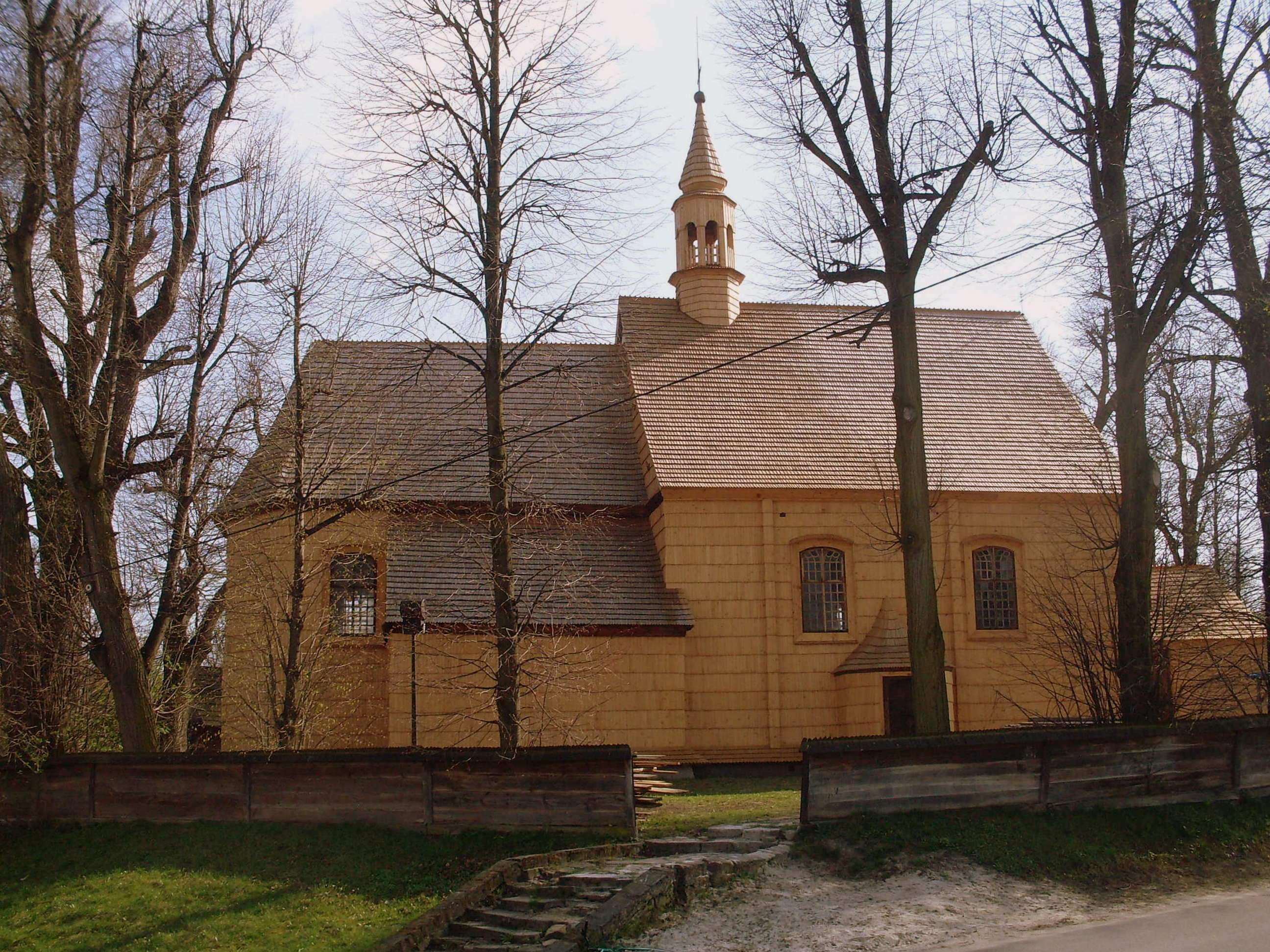 Krzemienica, kościół par. p.w. św. Jakuba Apostoła, 1754